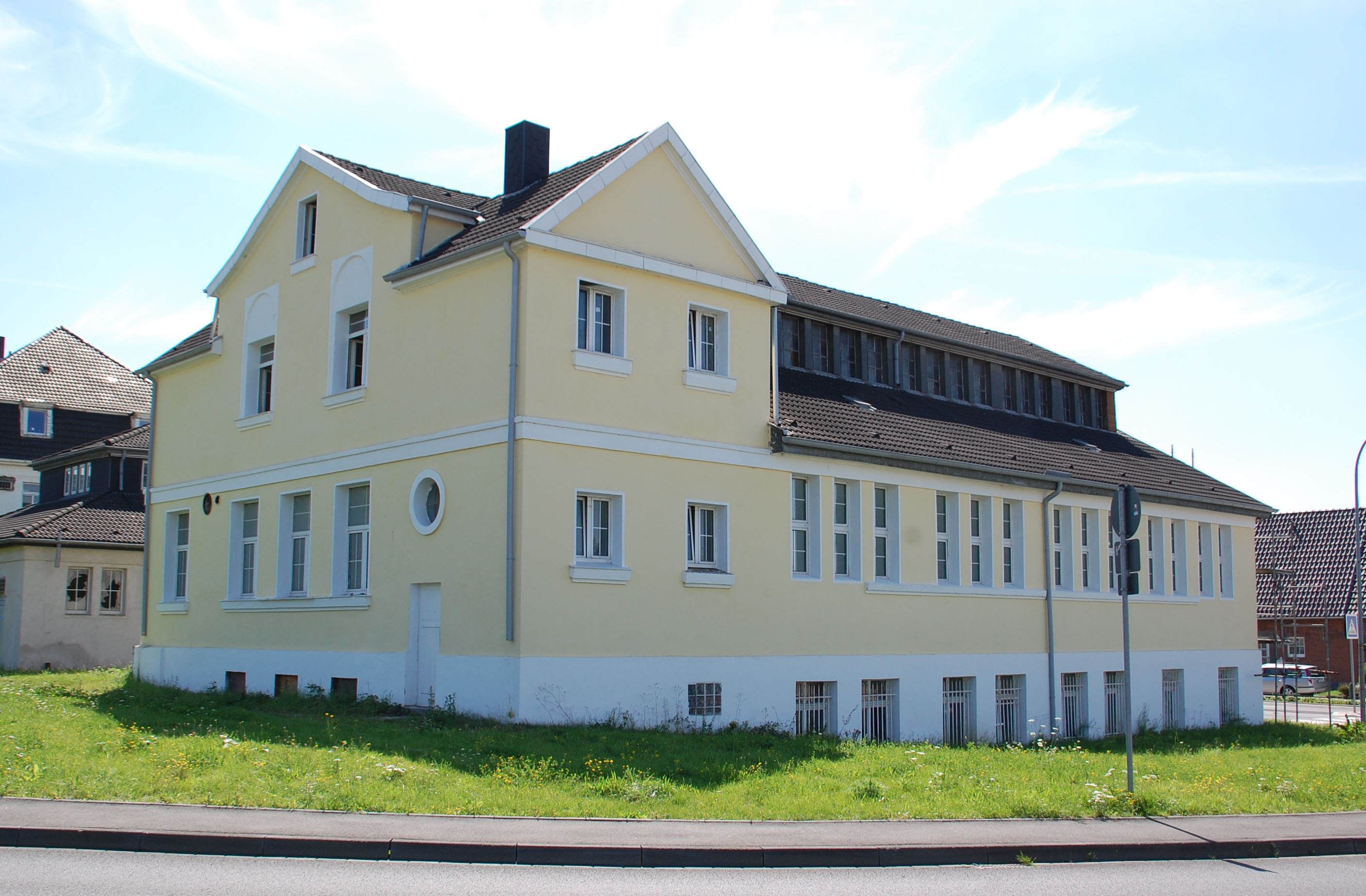 Havaria-Gelände an der Fischbachstraße in Quadrath-Ichendorf, Bergheim; 2011 unbenutzt, teilweise in Renovierung